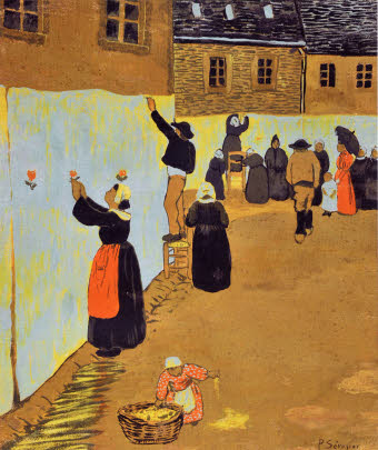 Paul Sérusier : la Fête-Dieu à Châteauneuf-du-Faou (tableau de 1894)